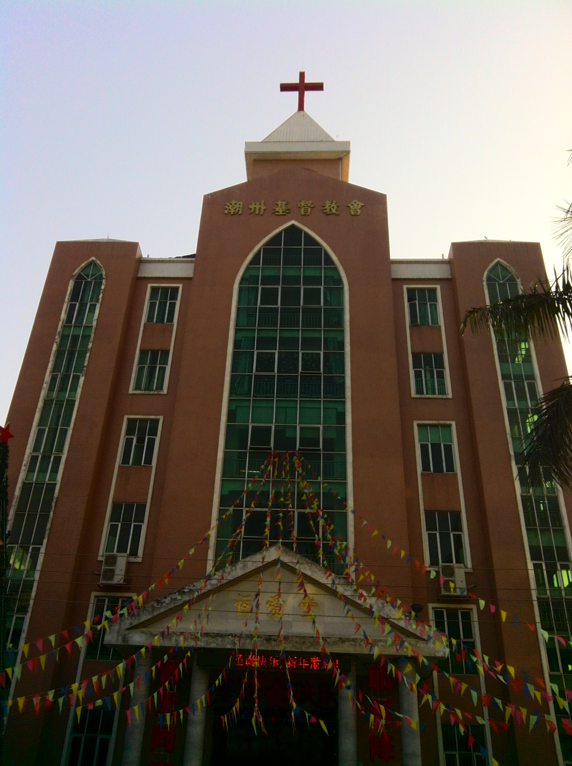 基督教恒爱堂，位于中国广东省潮州市湘桥区凤园路中段。